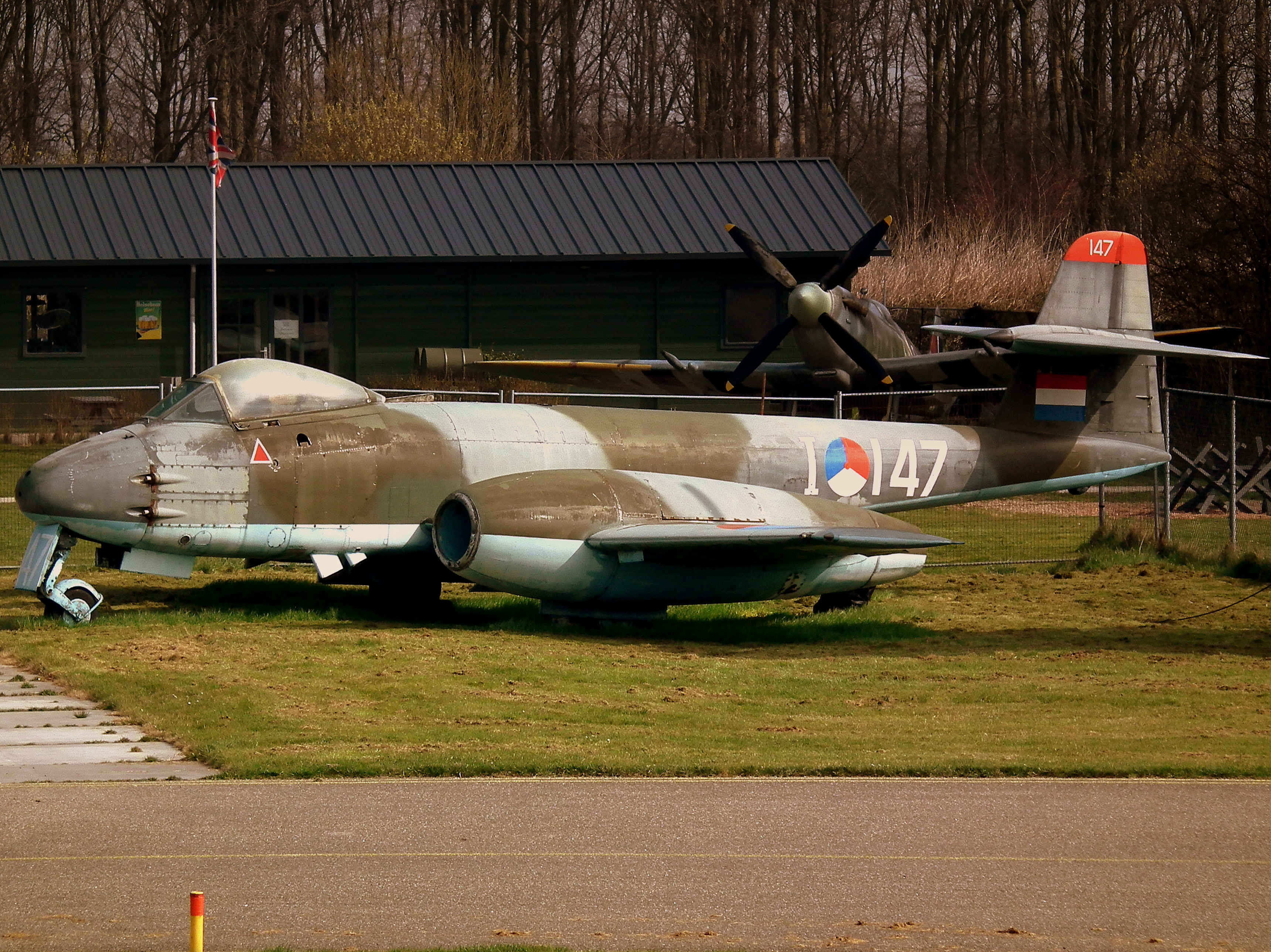 AVIODROME LELYSTAD HOLLAND MARCH 2011